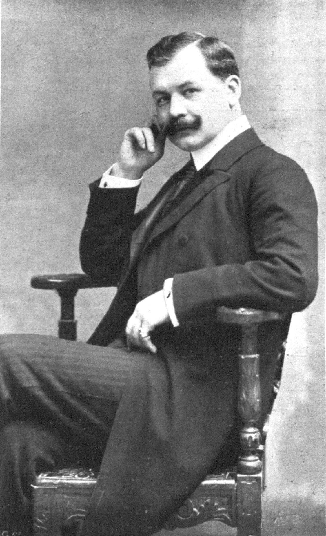 Lehár Ferenc